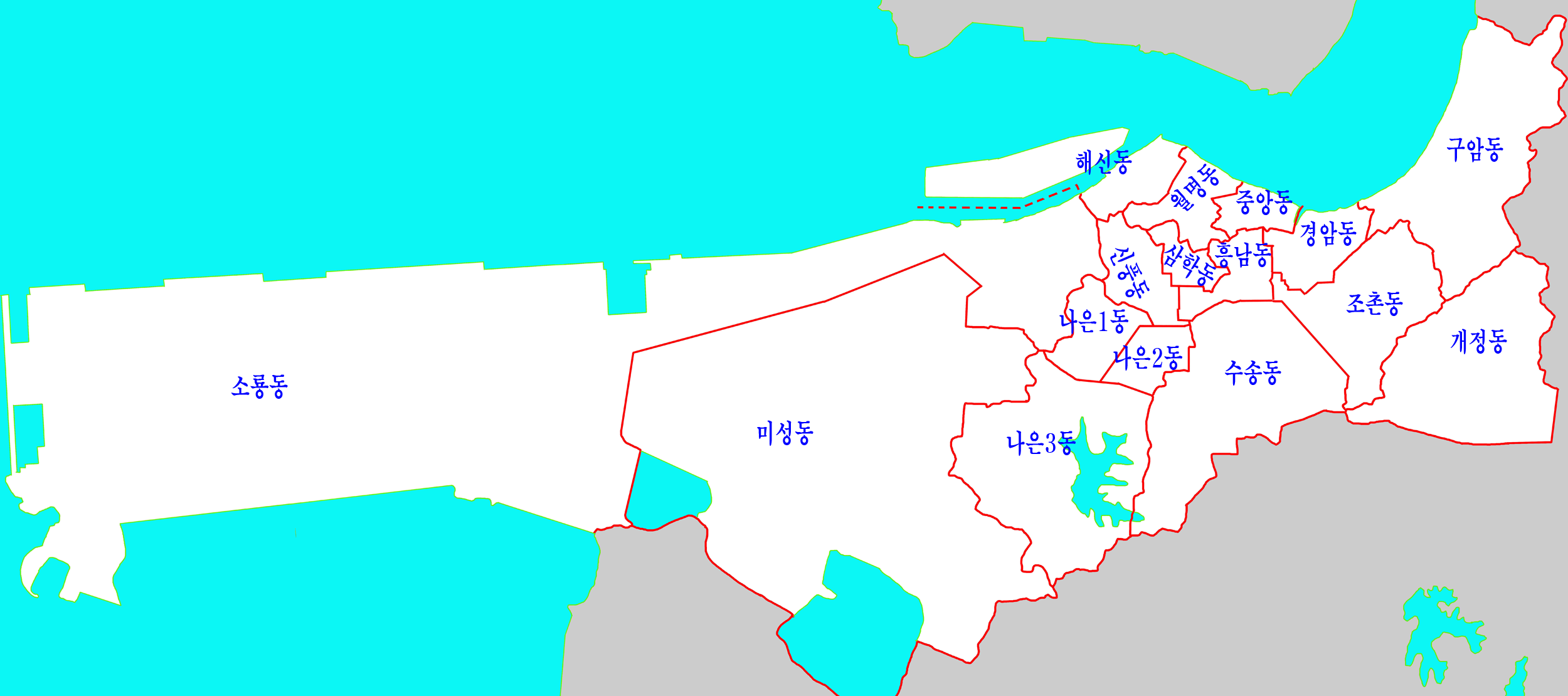 군산사내도